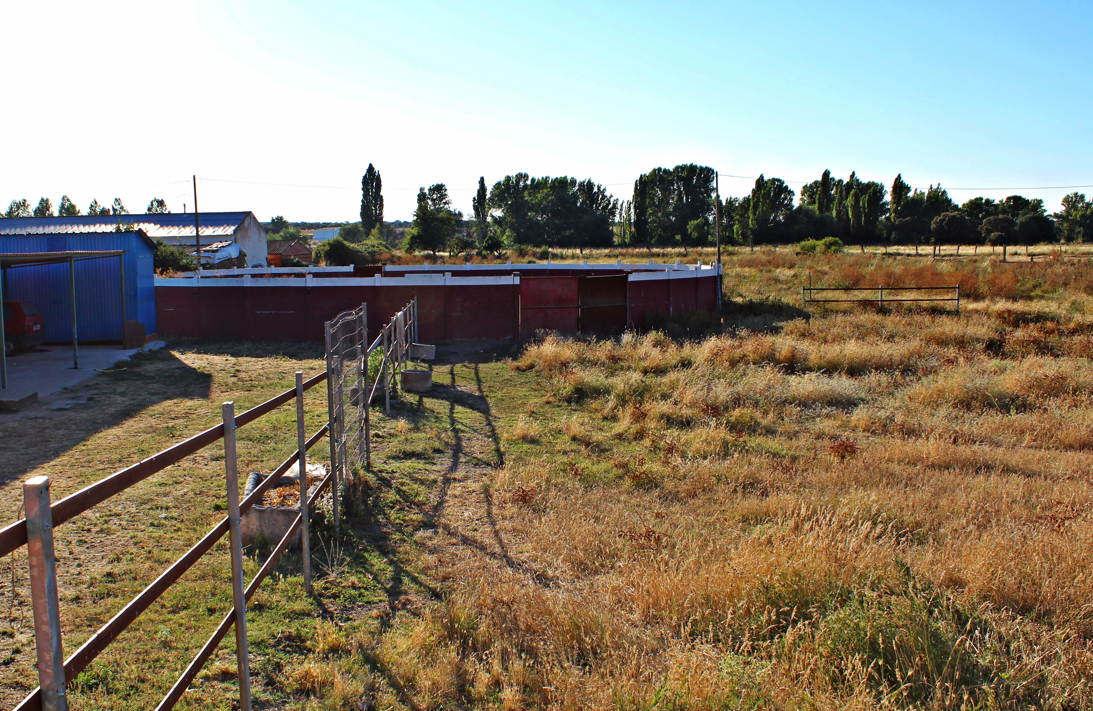 Vega de Tirados, provincia de Salamanca